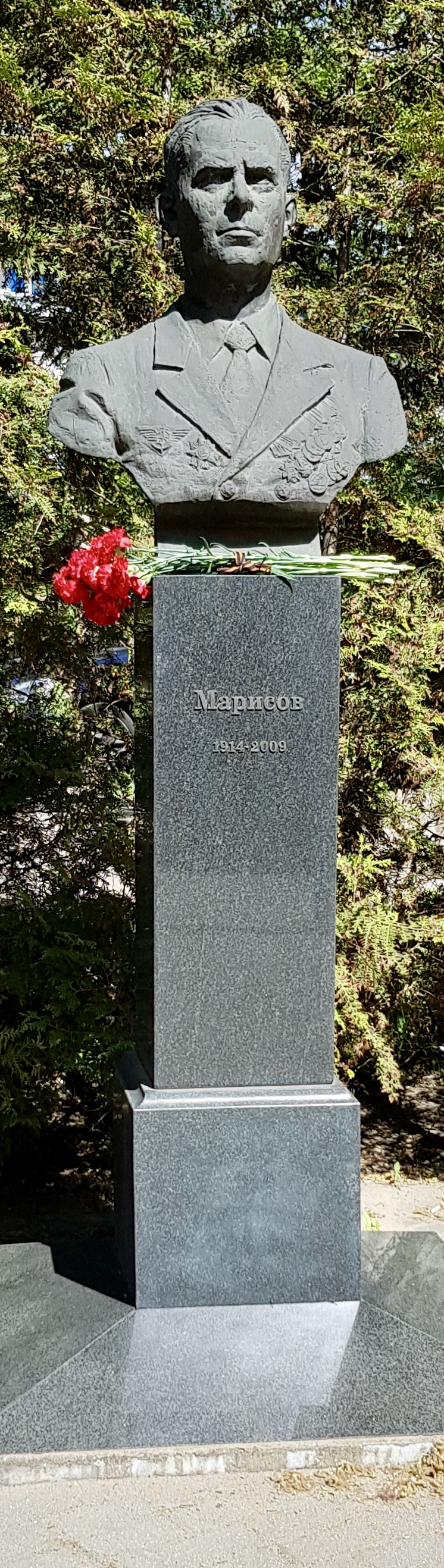 Памятник Марисову Борису Петровичу. Установленный 13 мая 2010г. у проходной Московского Южного речного порта .